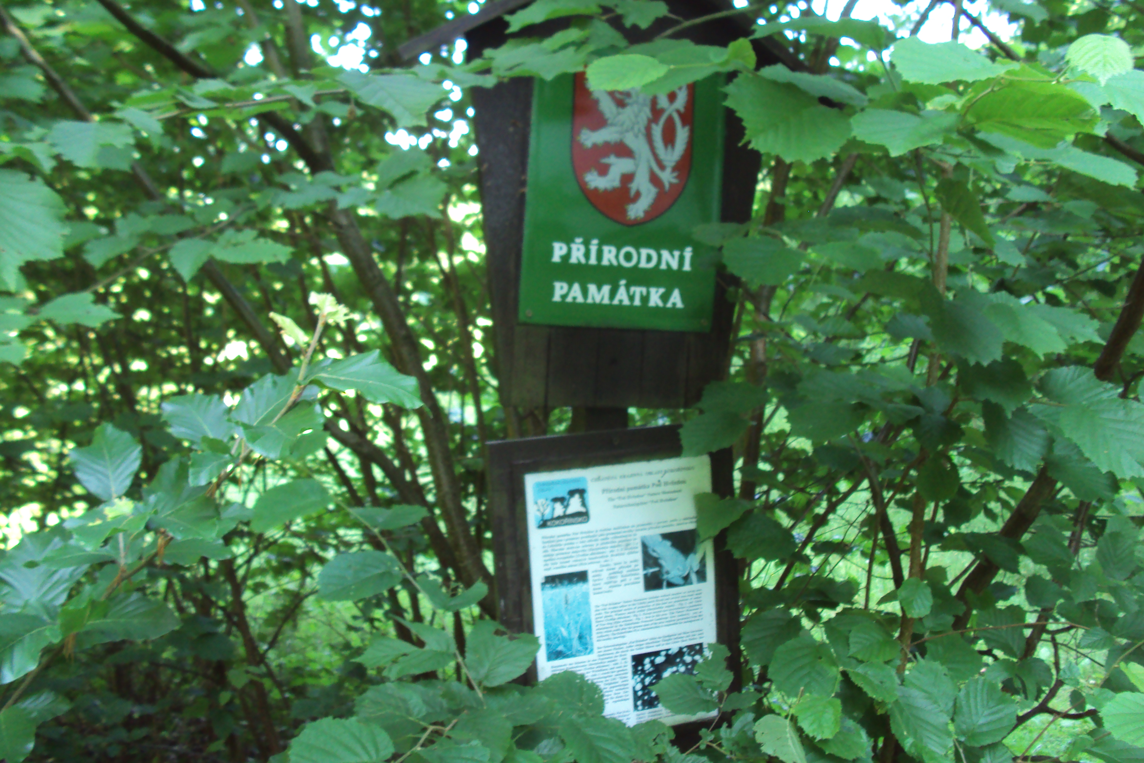 Přírodní památka Pod Hvězdou